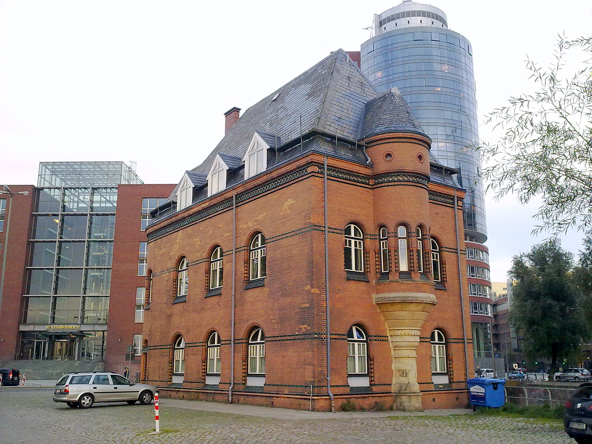 Wasserschutzpolizei-Revier WSPF 22 in Hamburg auf der Spitze der Kehrwiederinsel; Außenset / Drehort der ZDF-Serie Notruf Hafenkante